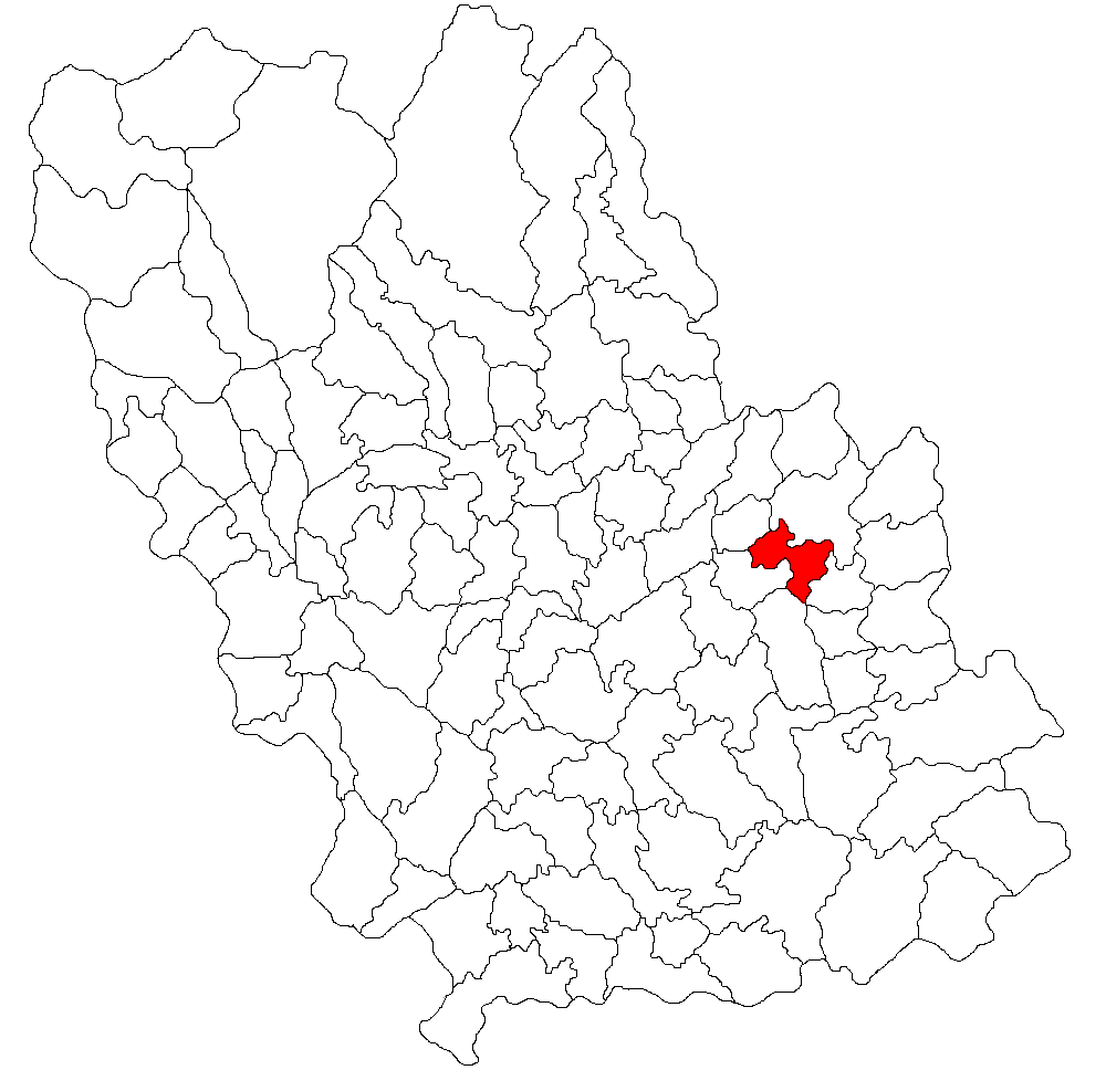 Categorie:Hărţi ale judeţului Prahova